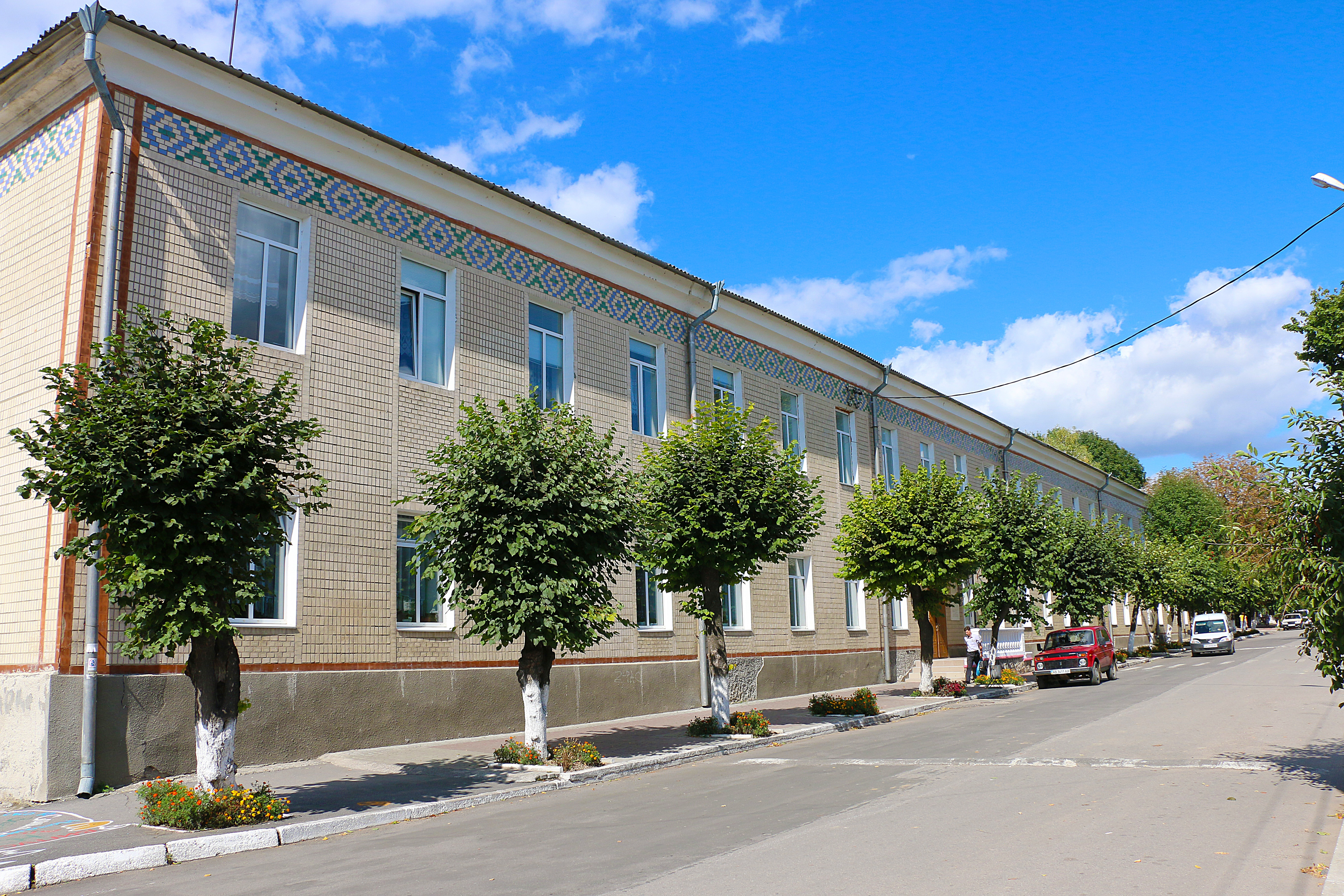 Комплекс Немирівської гімназії. Чоловічий корпус, в якому працювали О.В. Маркович, вчились Г.Мачтет, М. Трублаїні, Немирів, вул. Луначарського,27